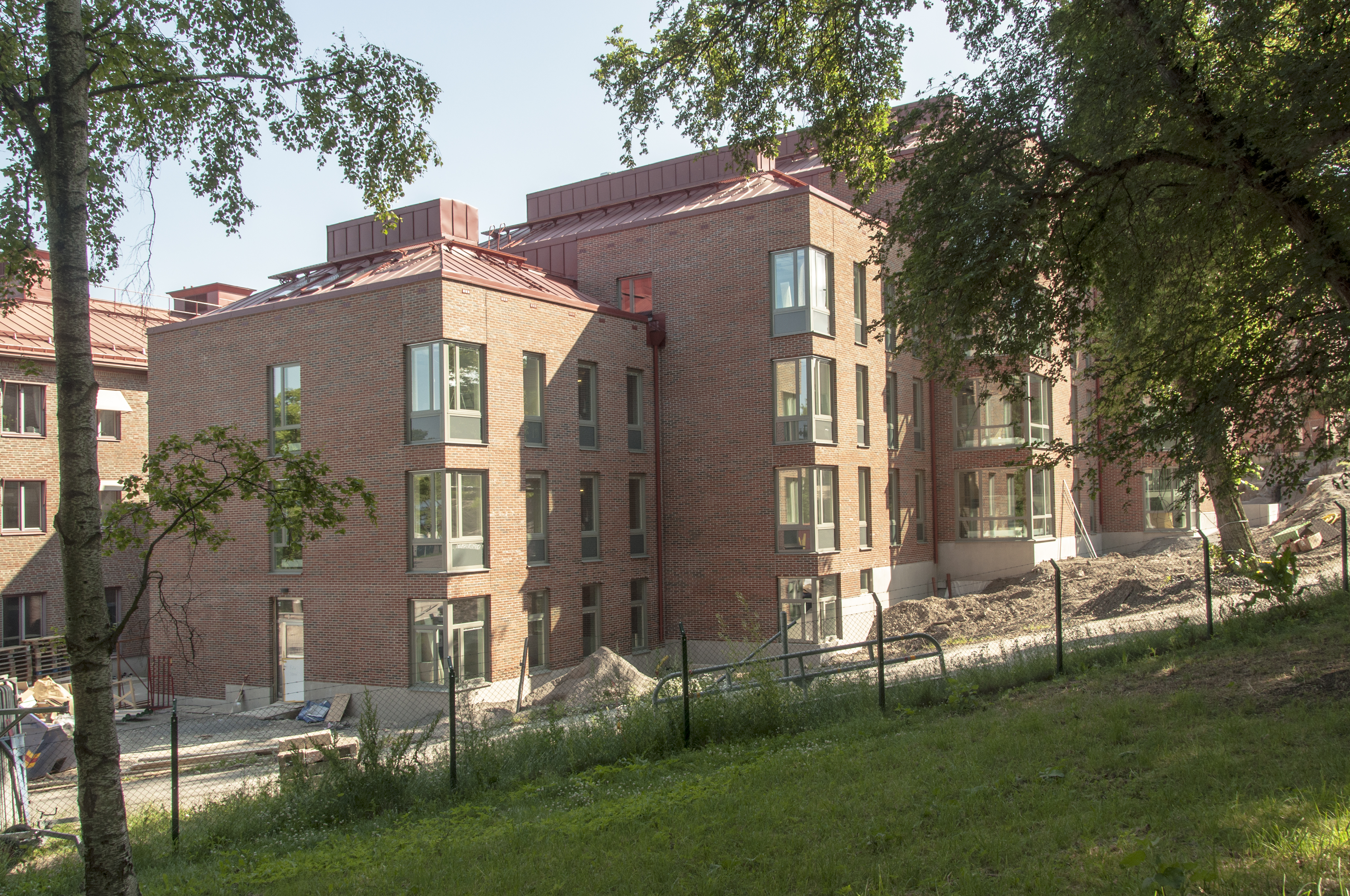 BB Sophia under byggnad. Reflex Arkitekter.